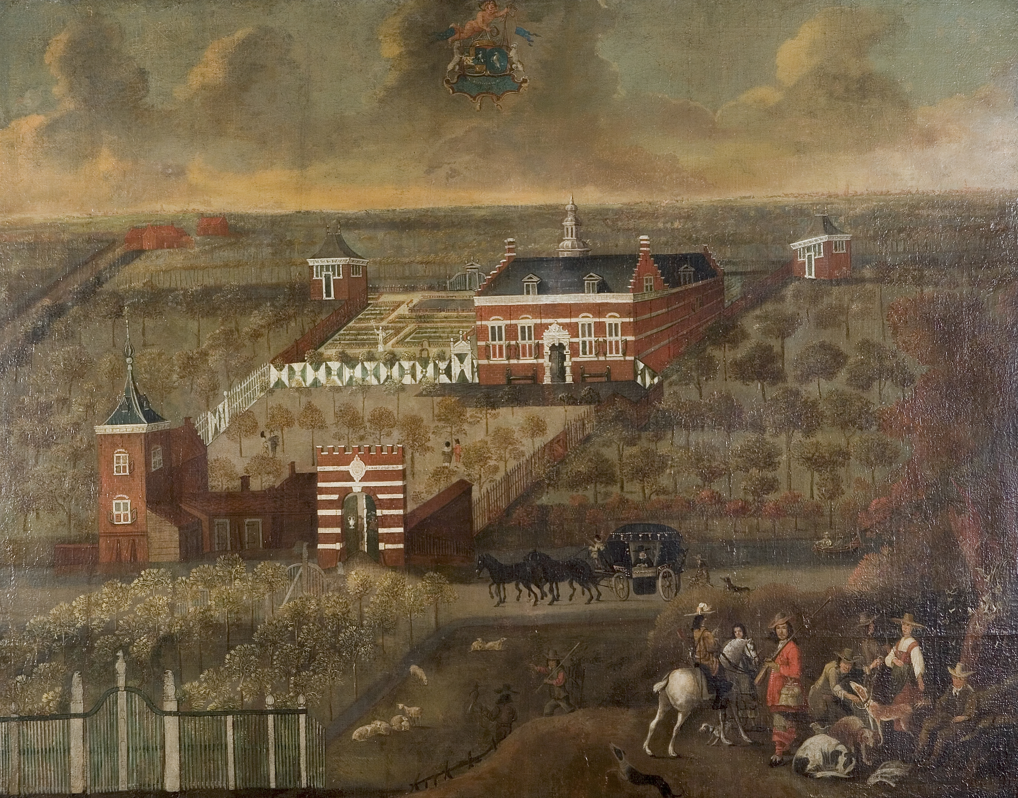 Hof Lammerenburg.